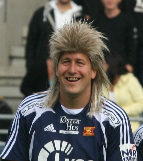 Alf Kåre Tveit